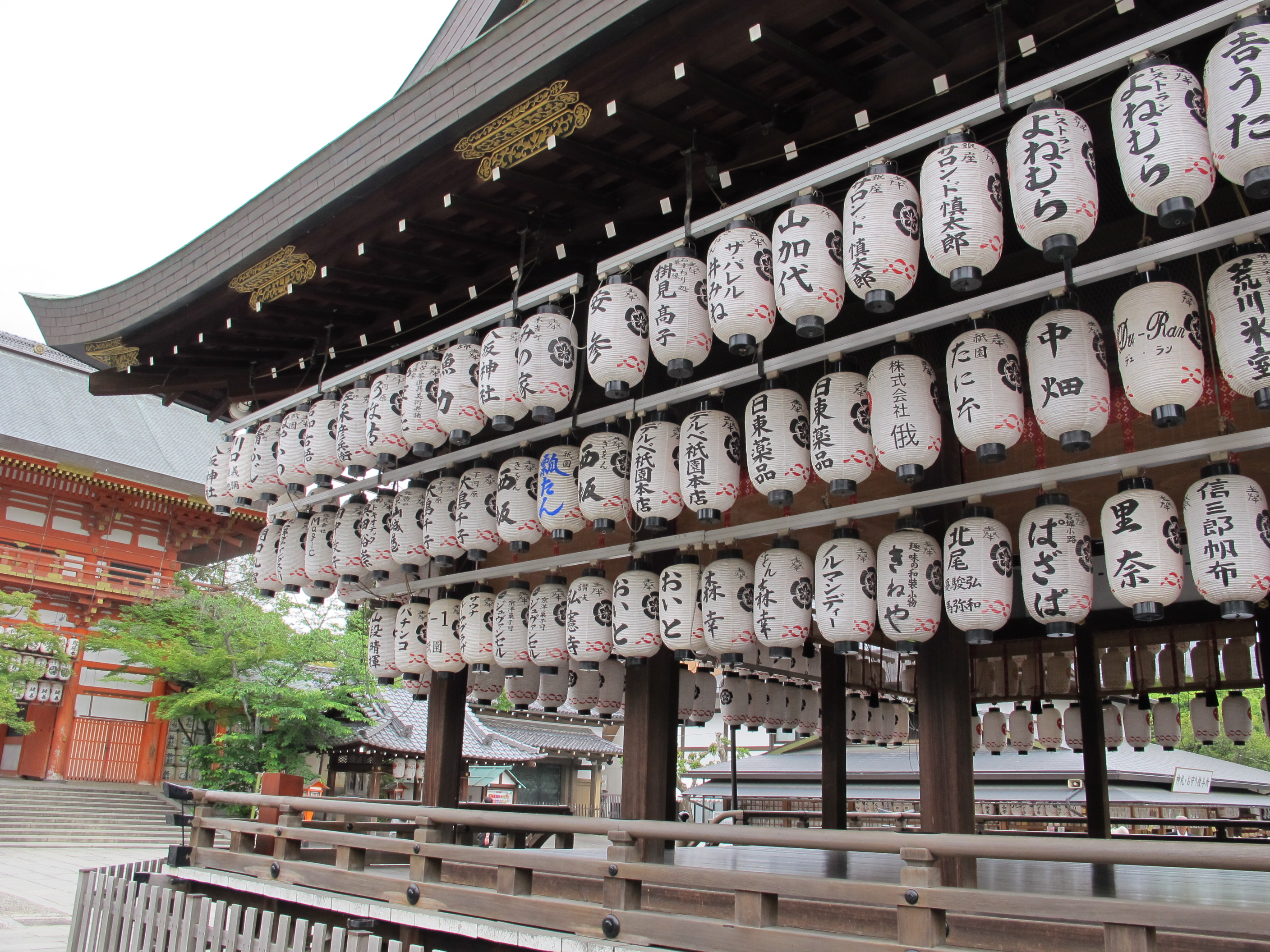 Santuario yasaka